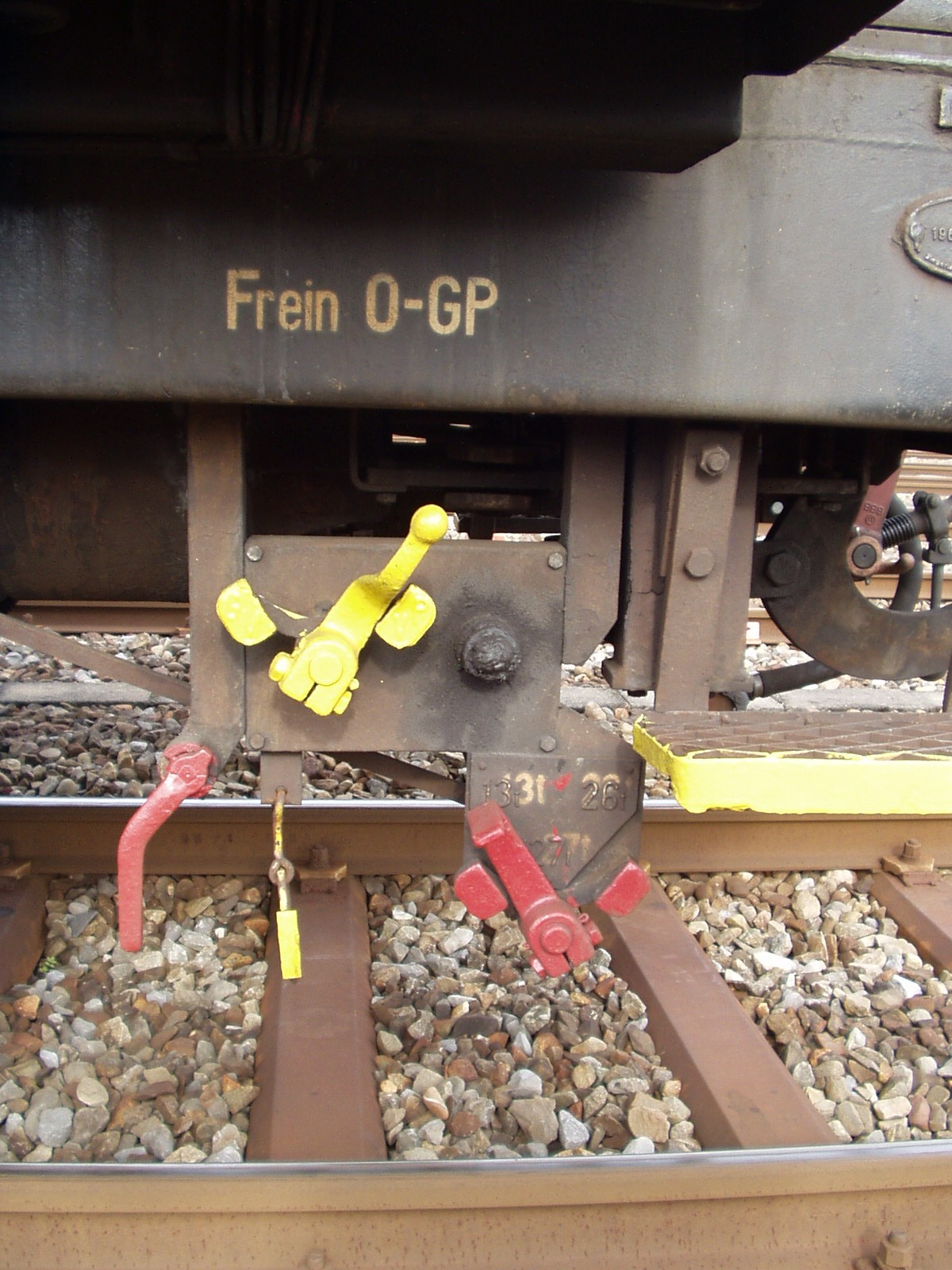 Bremsumstellvorrichtung eines Güterwagens Typ Fs-U der SBB. Aufgenommen am 30.09.2005 im RB Limmattal durch S.Hinni (eigenes Bild)